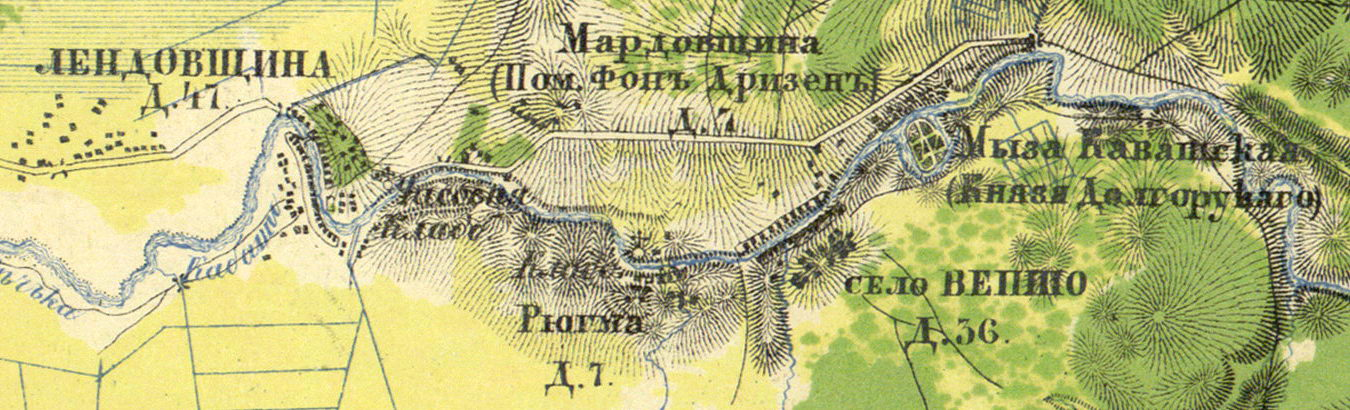 Деревня Коваши на карте 1860 года.